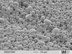 Struktur materiálu po odstranění parafinu